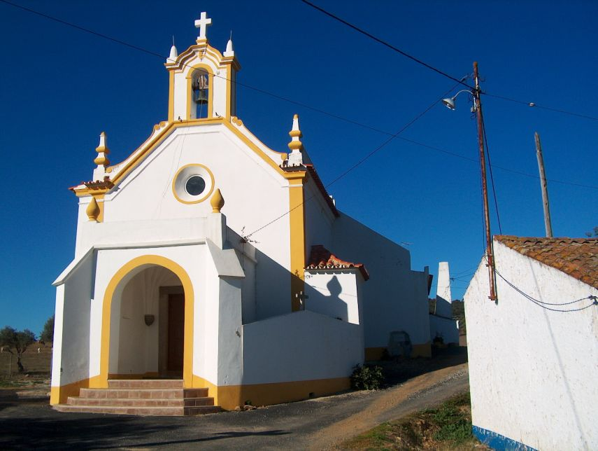 Igreja paroquial de São Brissos, São Brissos, Santiago do Escoural, Montemor-o-Novo